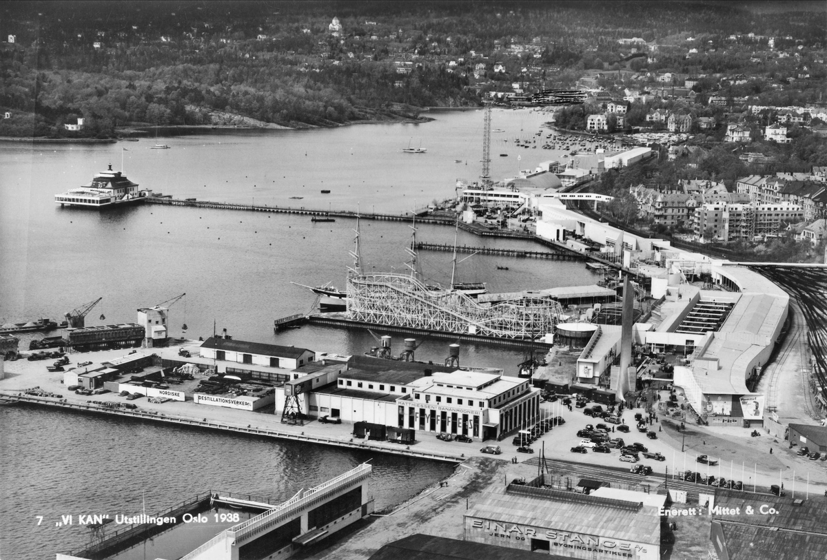 Vi kan-utstillingen på Frognerstranda ved Frognerkilen i 1938